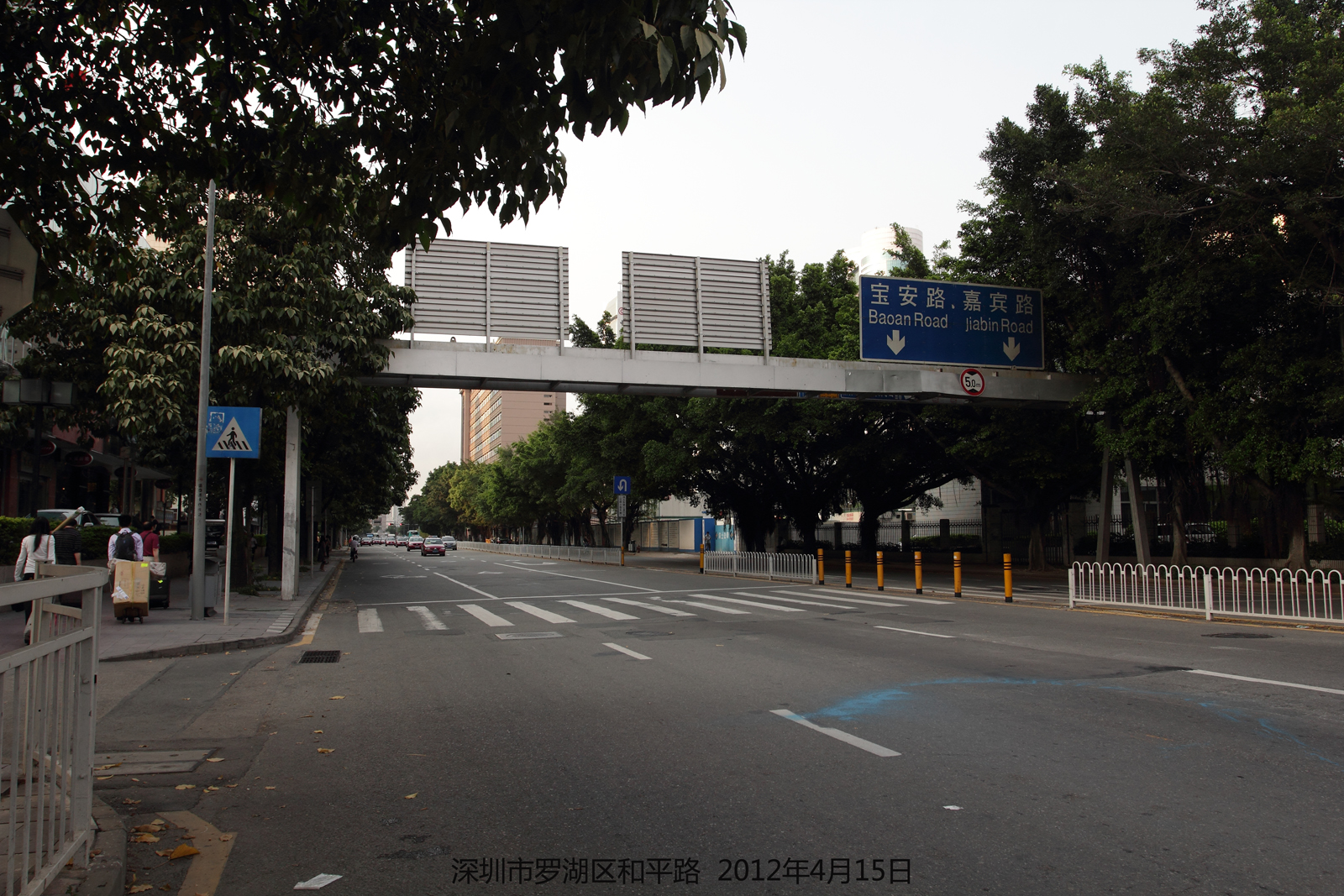 和平路 he ping lu